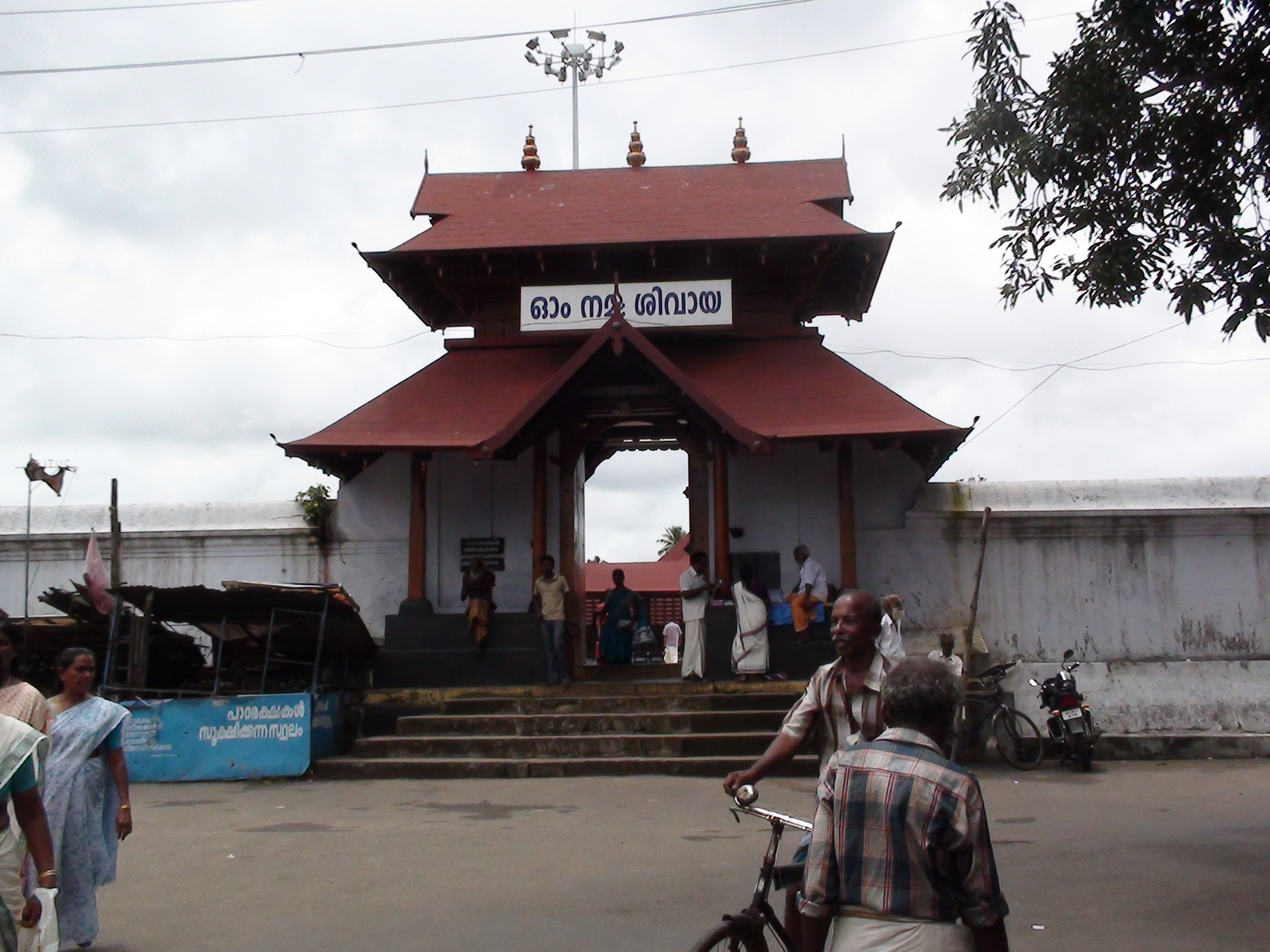 വൈക്കം മഹാദേവക്ഷേത്രം, പടിഞ്ഞാറേ ഗോപുരത്തിൽ നിന്നുള്ള ദൃശ്യം